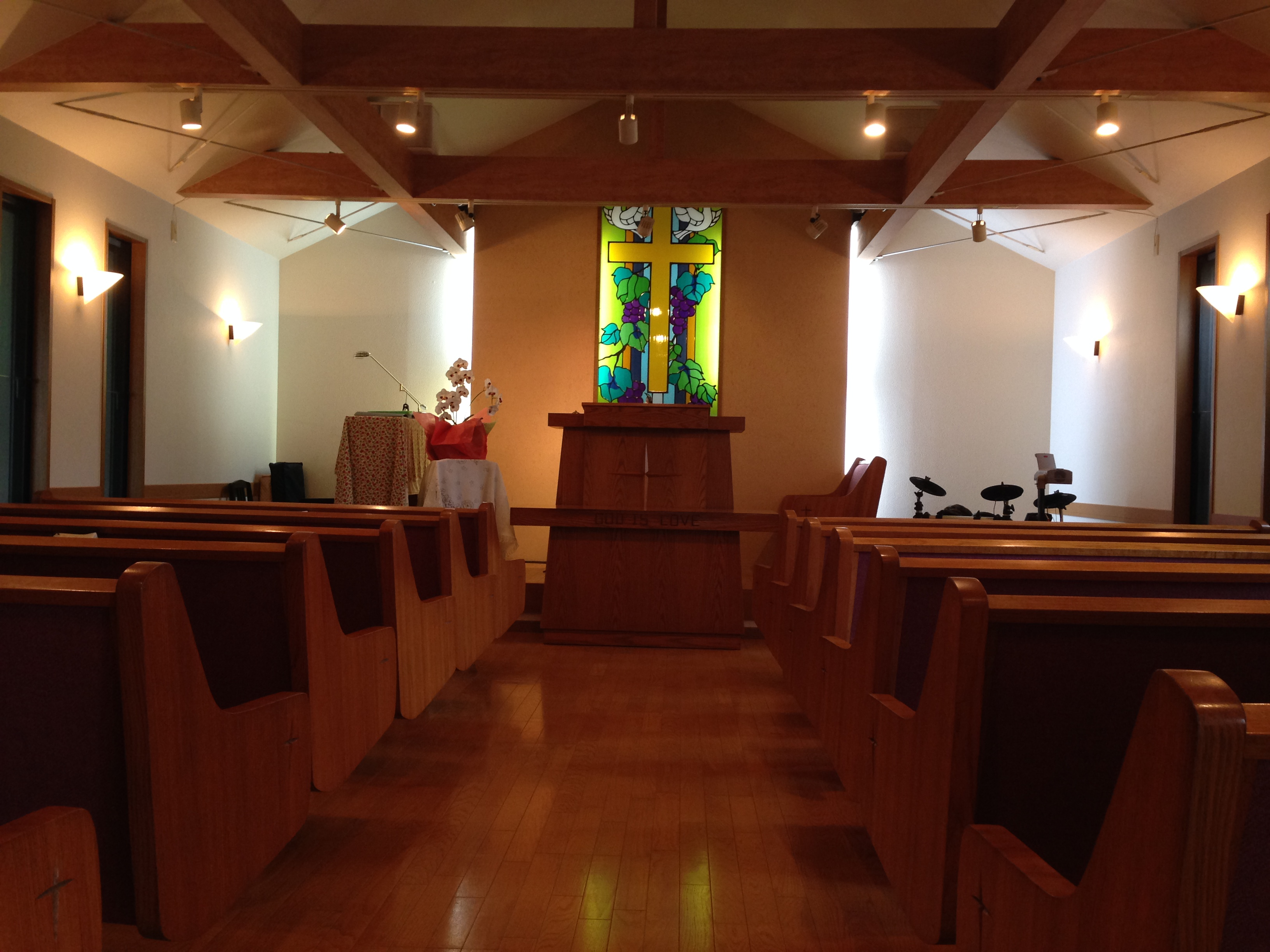 小郡めぐきキリスト教会礼拝堂